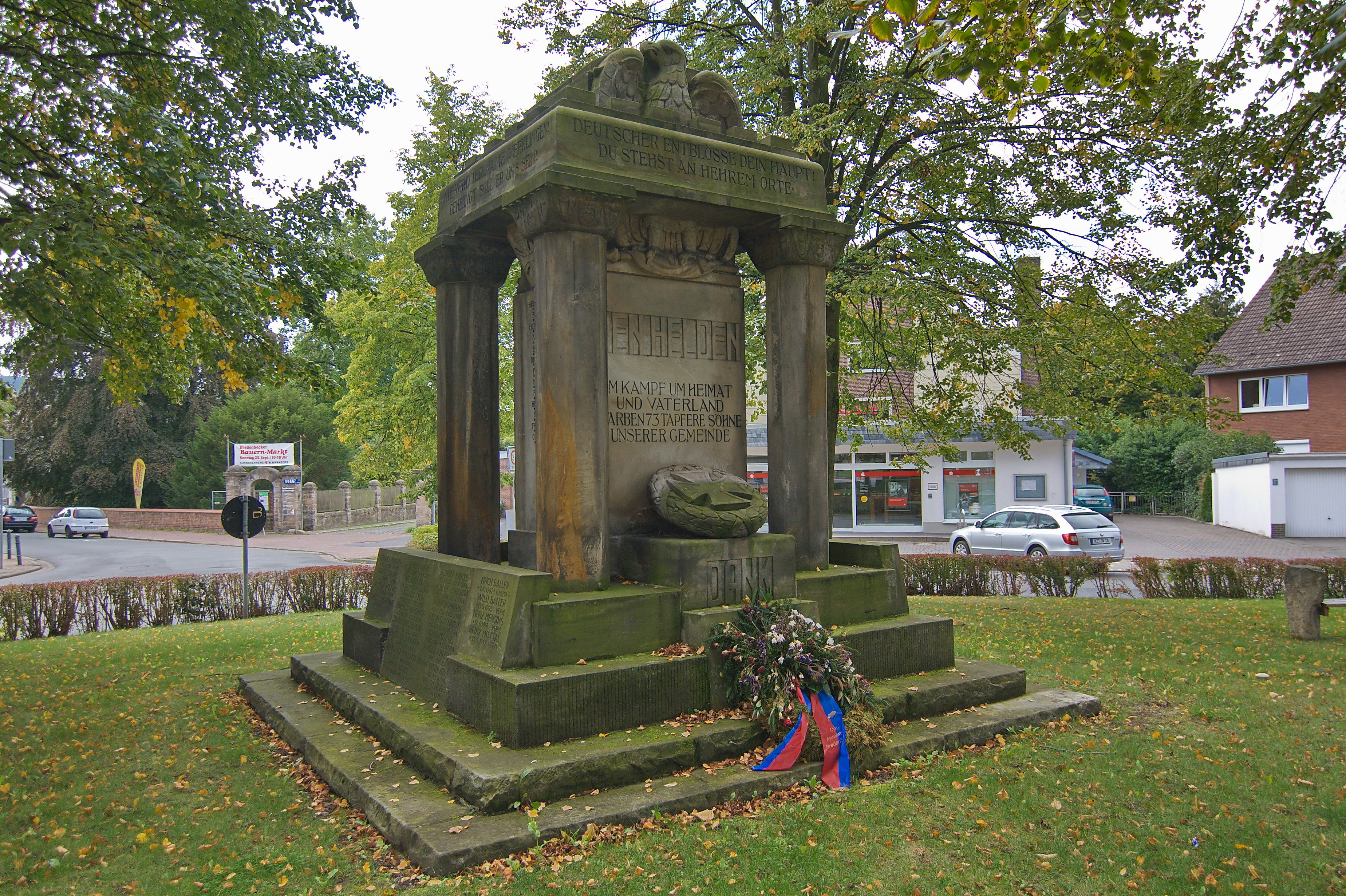 Kriegerdenkmal in Bredenbeck (Wennigsen), Niedersachsen, Deutschland